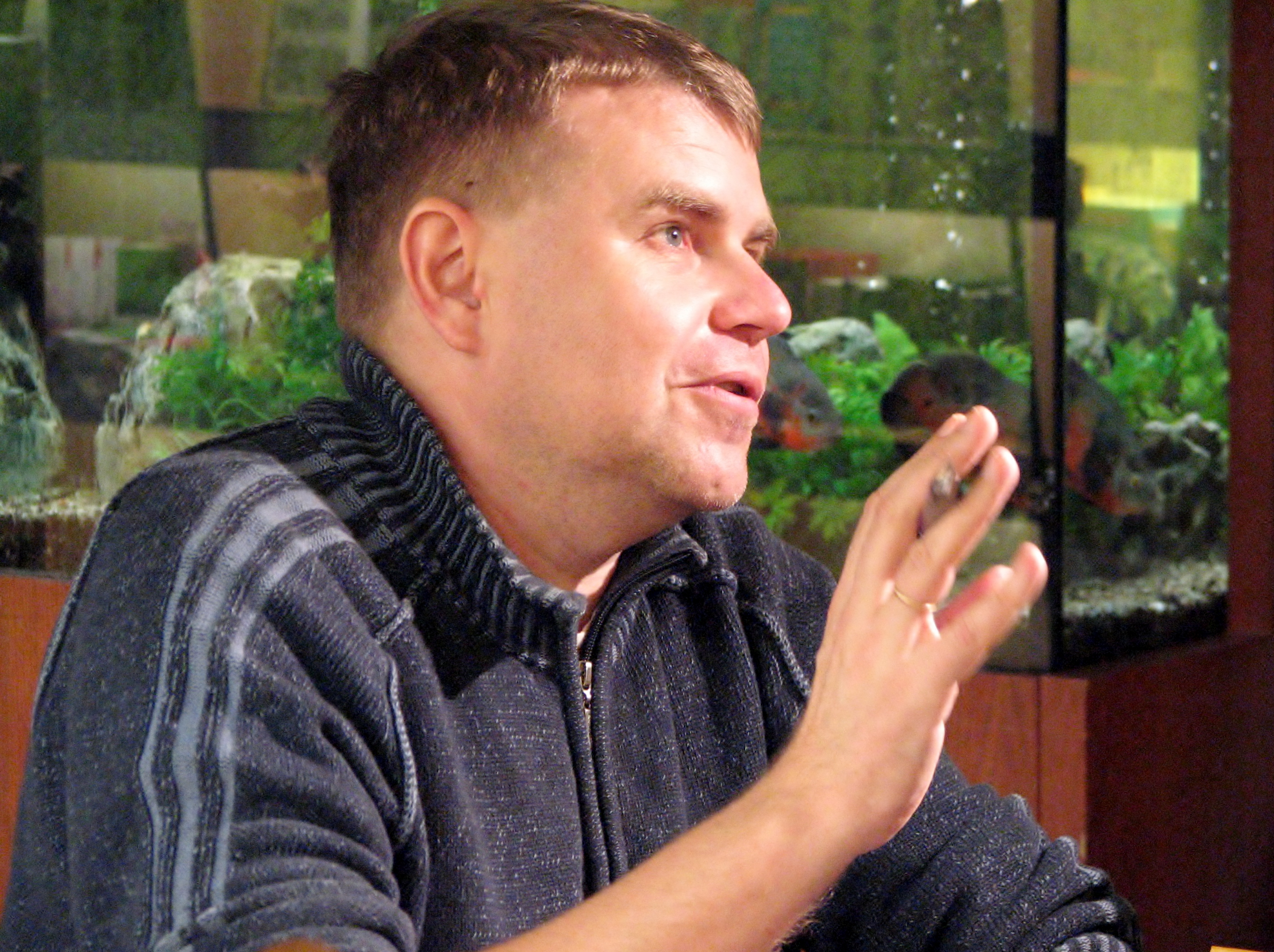 Andrus Kivirähk oma raamatusse "Lood" autogramme jagamas